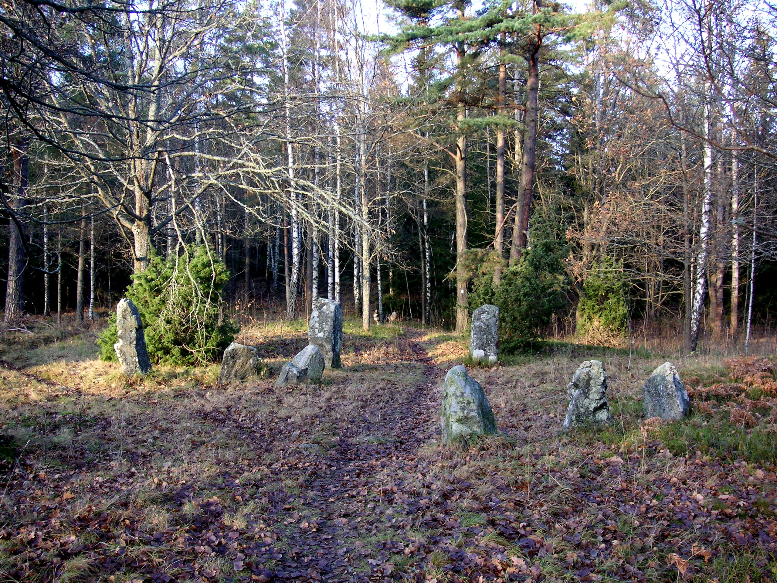 Bornsjön Stockholms län, järnåldersgrav vid Bergaholm, RAÄ-nummer: Salem 236:1